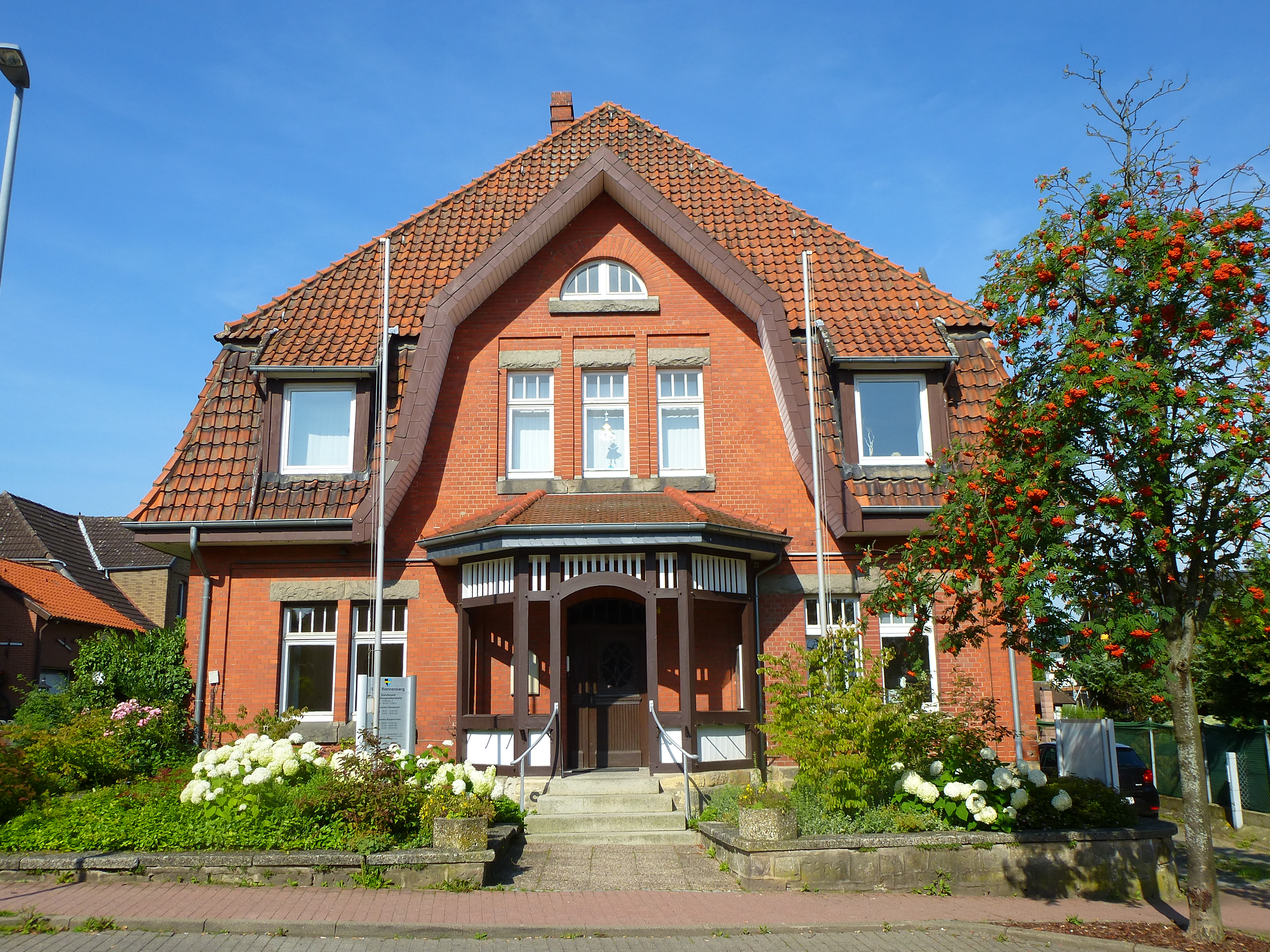 Standesamt und Verwaltungsnebenstelle der Stadt Ronnenberg